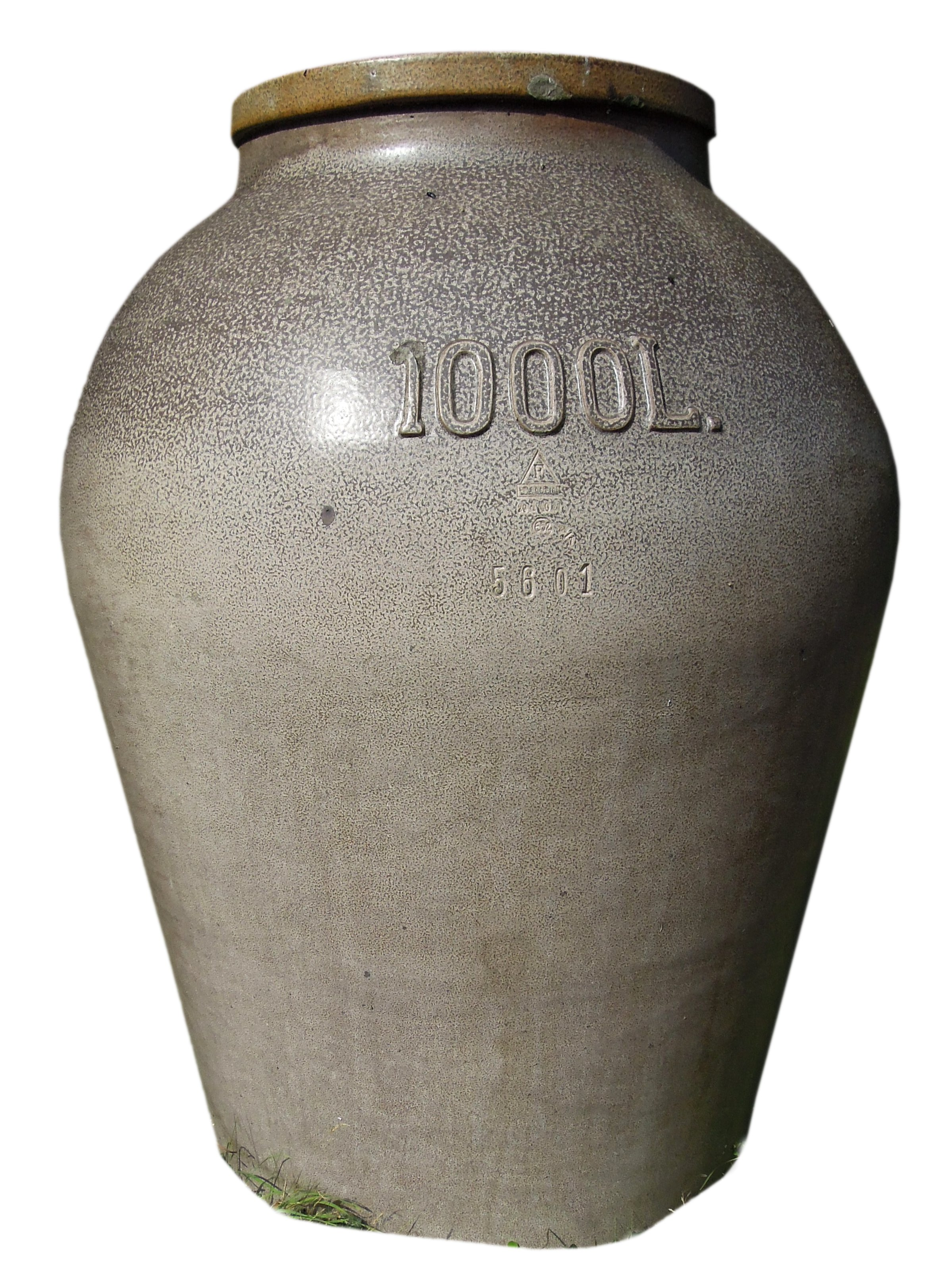 Krug mit 1000 Litern Fassungsvermögen